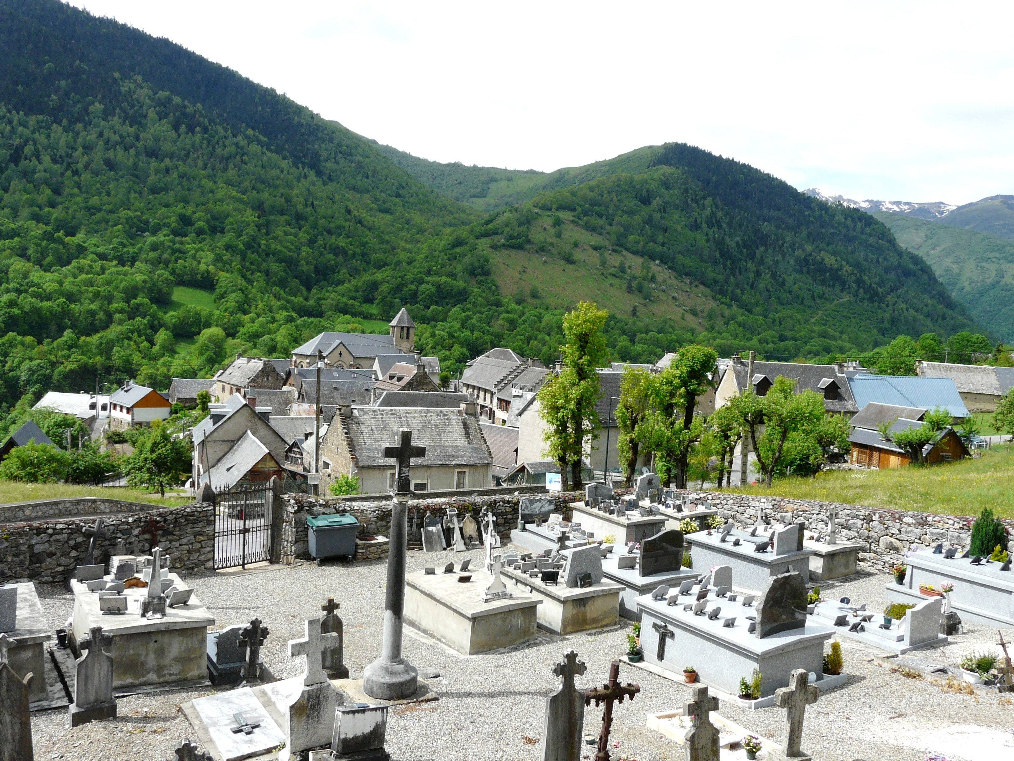 Le village de Castillon-de-Larboust, Haute-Garonne, France.